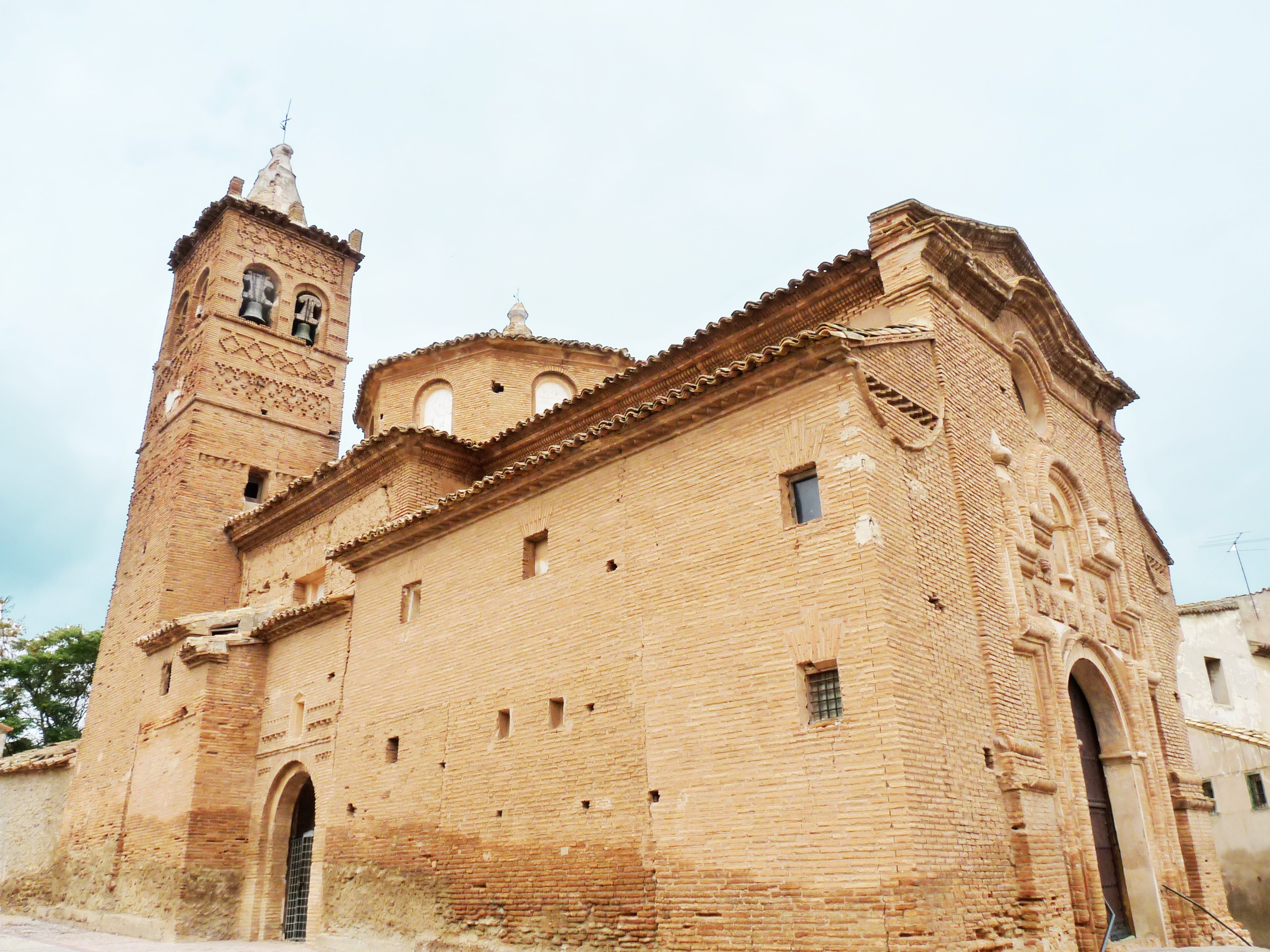 Ambel - Ermita de la Virgen del Rosario - Vista completa